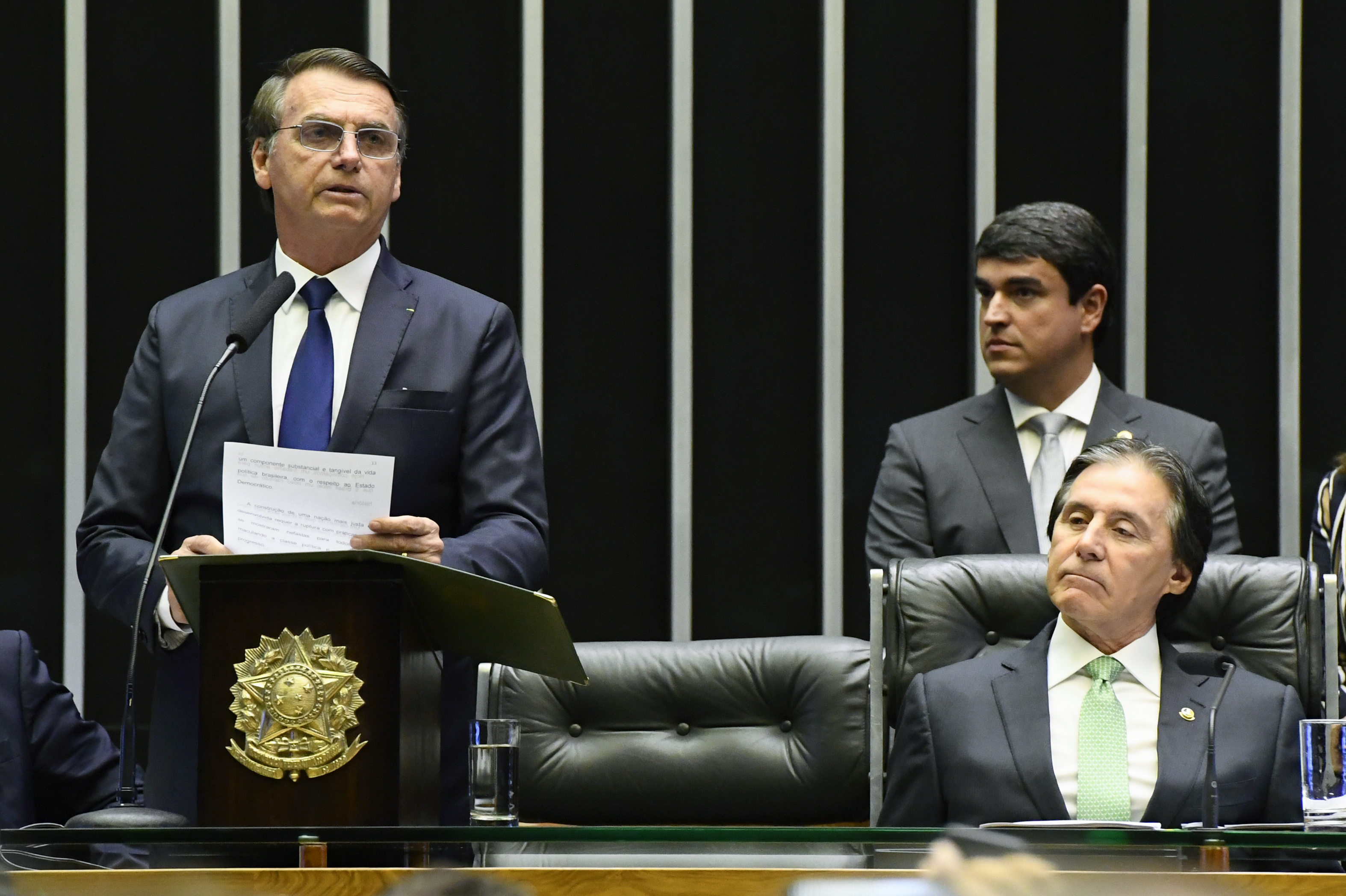 Plenário da Câmara dos Deputados durante sessão solene do Congresso Nacional destinada a dar posse ao presidente e ao vice-presidente da República. Presidente da República, Jair Bolsonaro, lê discurso de posse. Foto: Marcos Oliveira/Agência Senado